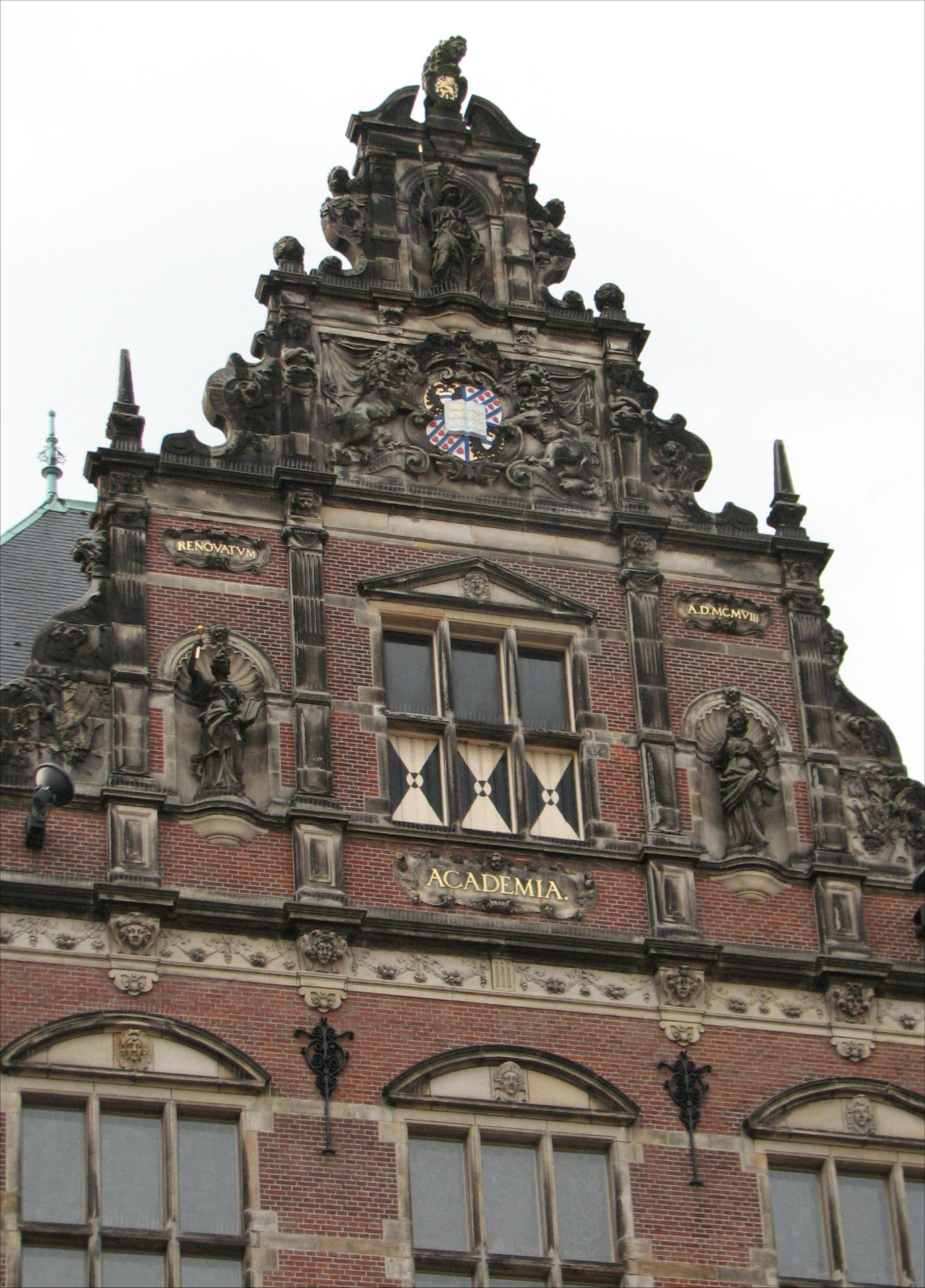 Gavl universitetet